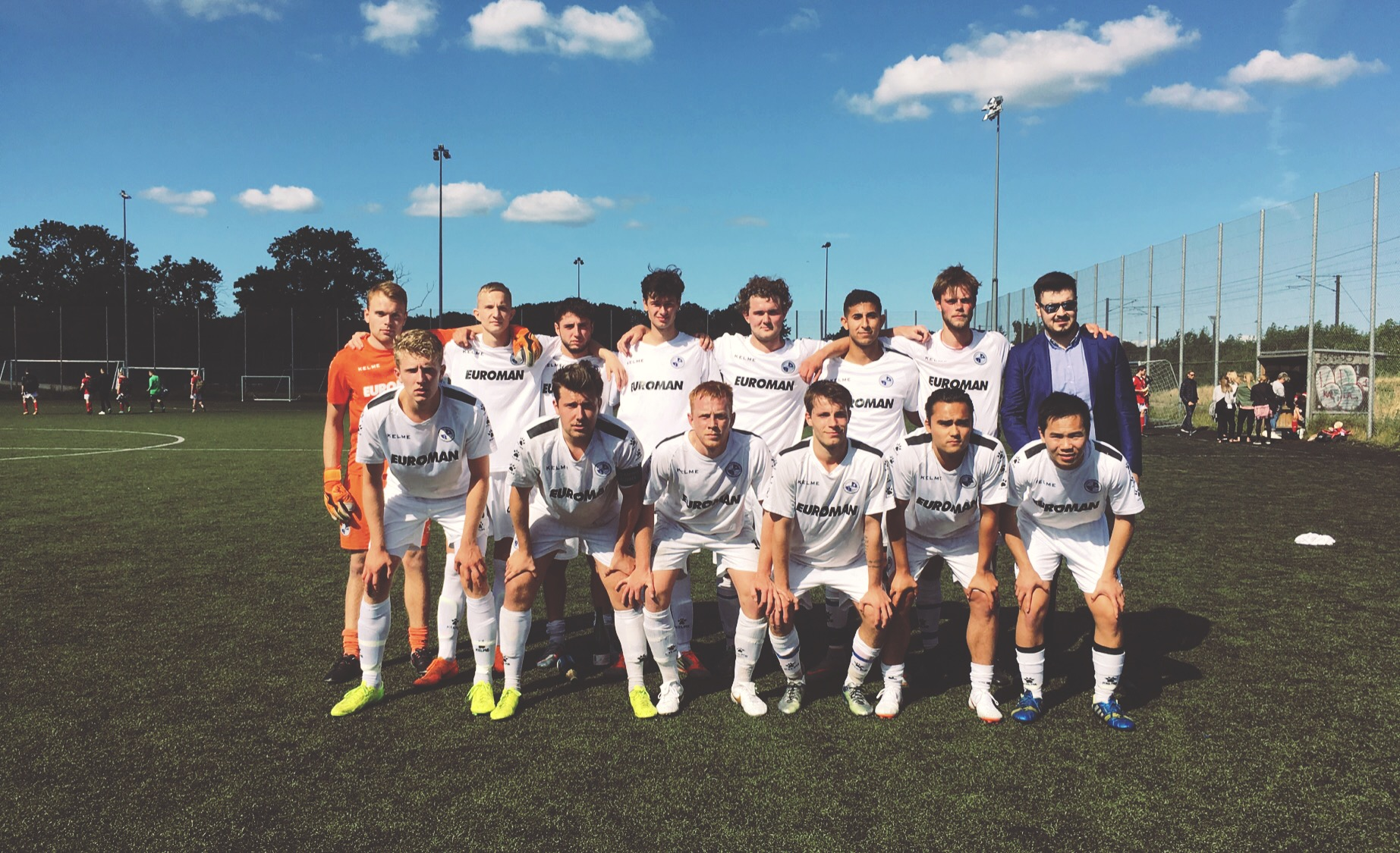 Holdbillede af FC Nordhavns 1. senior, der spillede 2-2 mod Egedal Boldklub d. 23. juni 2018 i sæsonens sidste kamp.